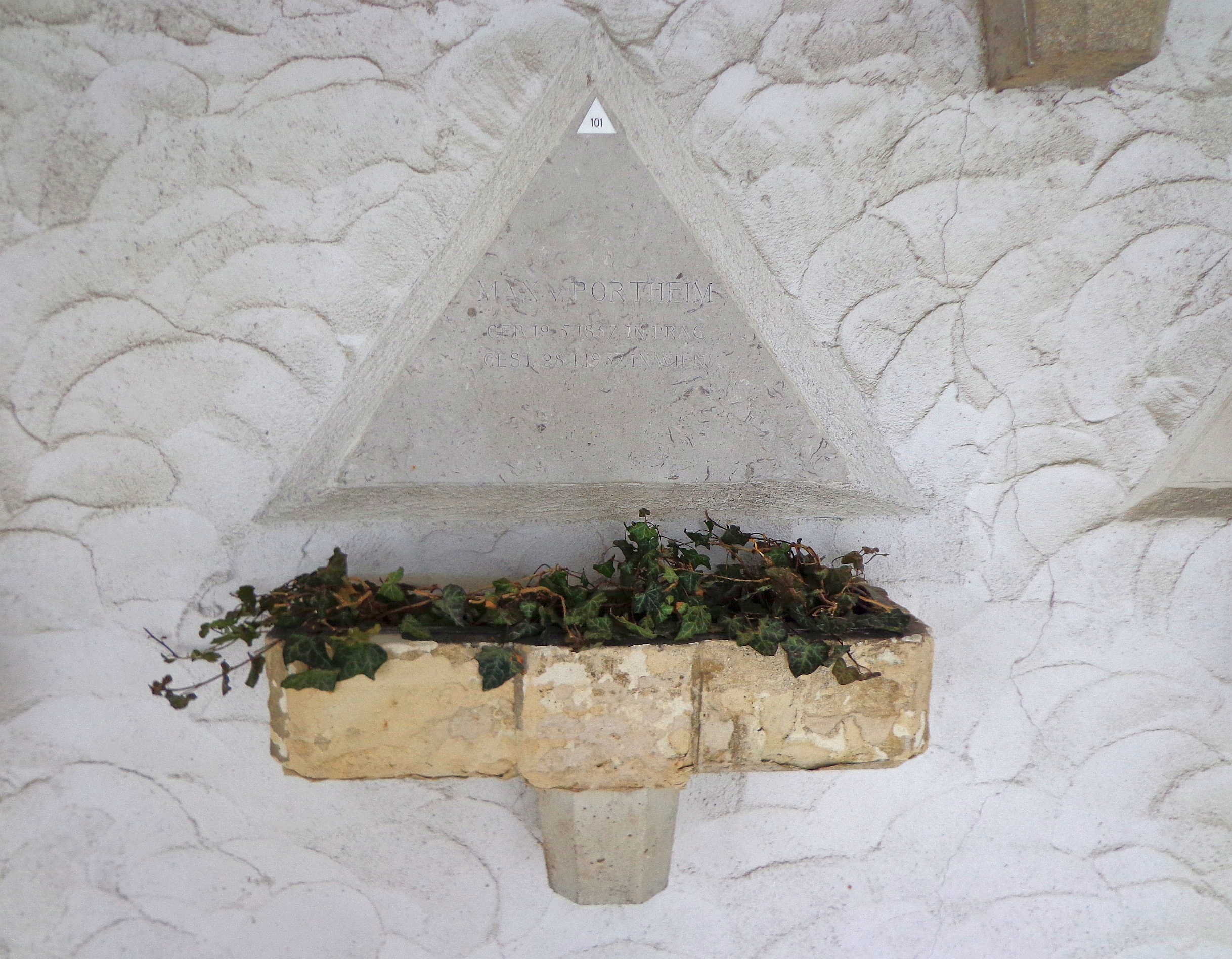 Feuerhalle Simmering - Arkadenhof (Abteilung ALI) - Urnengrab des Privatgelehrten und Sammlers Max von Portheim